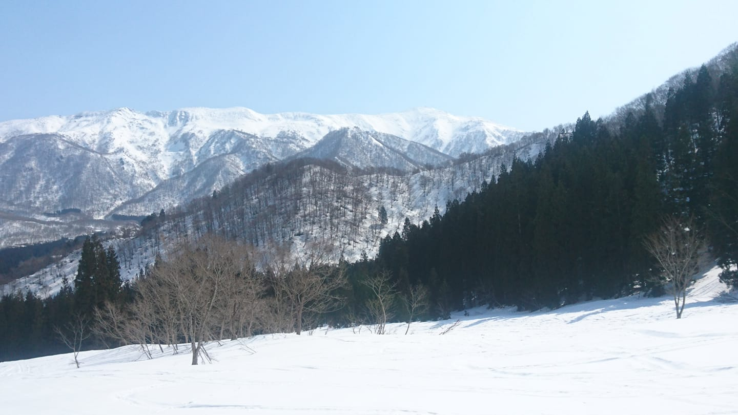 米子頭山-柄沢山（からさわやま）の山並を西方から望む